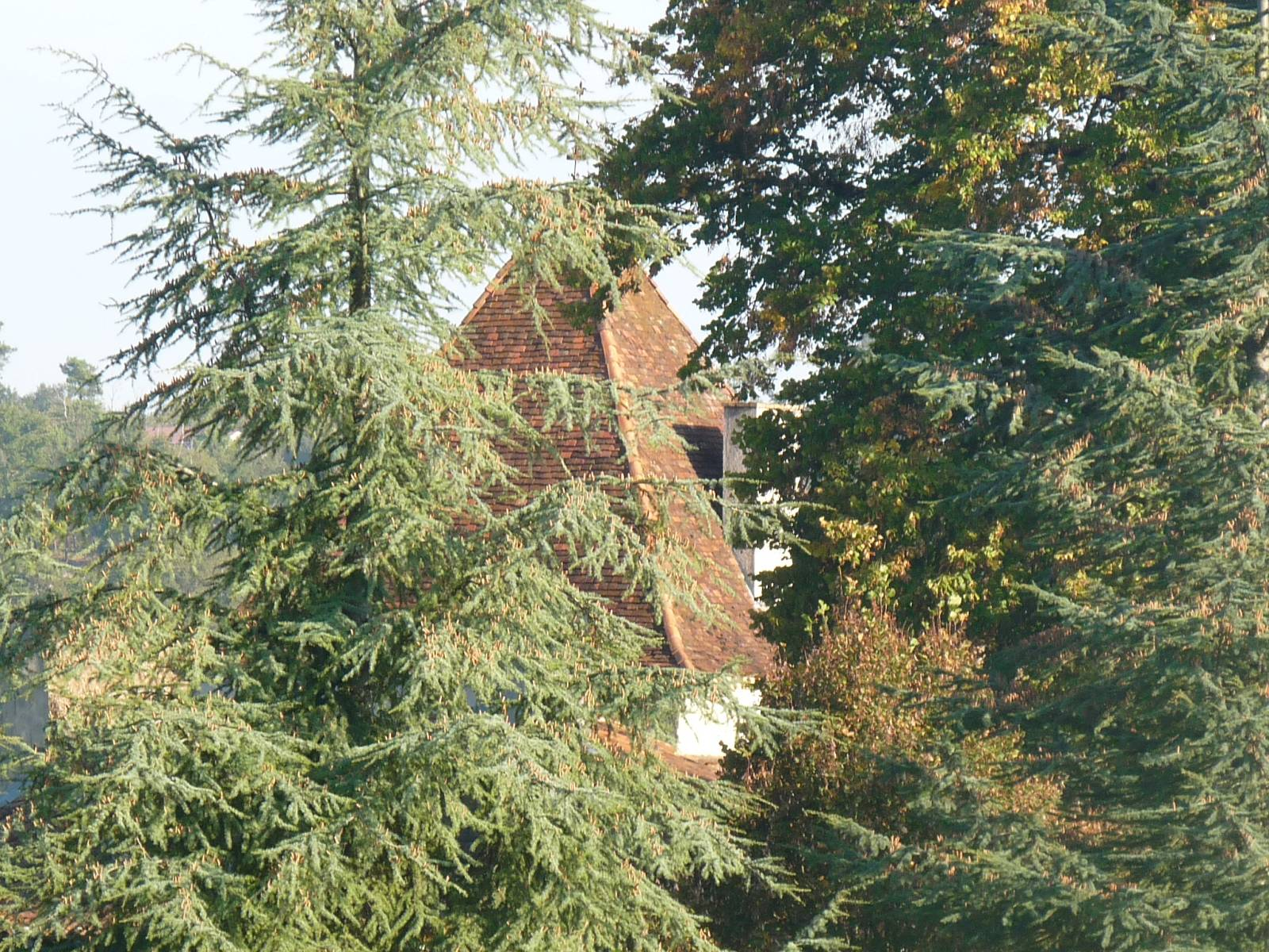 château de Chabreville, Courgeac (16), France